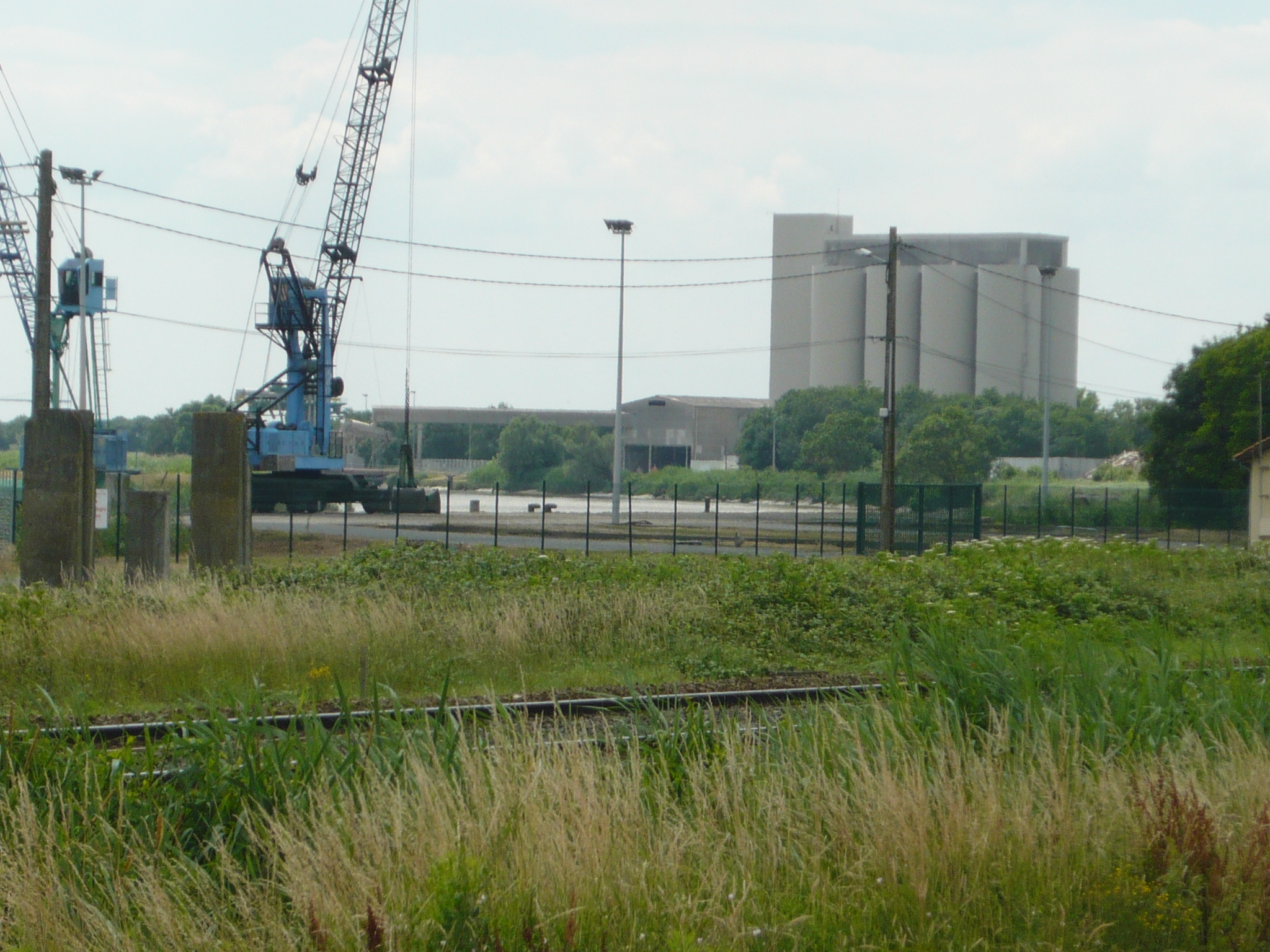 Le silo et les grues du port de Tonnay-Charente